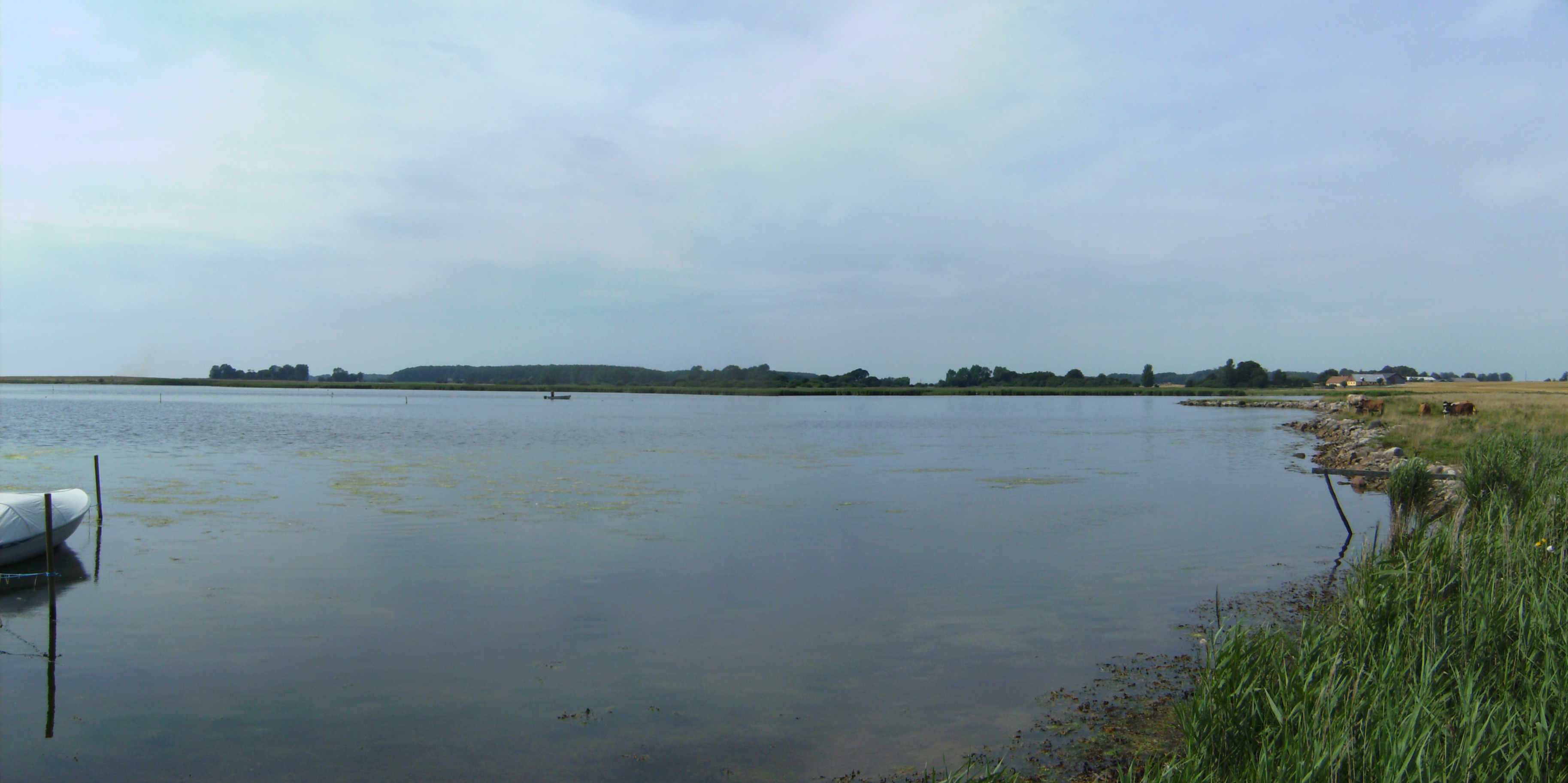 Billeder fra Herritslev Nor og Herritslev Mose vest for Nysted Pictures from the area west of Nysted, Denmark Herritslev Nor - Rørmosen set fra sydøst